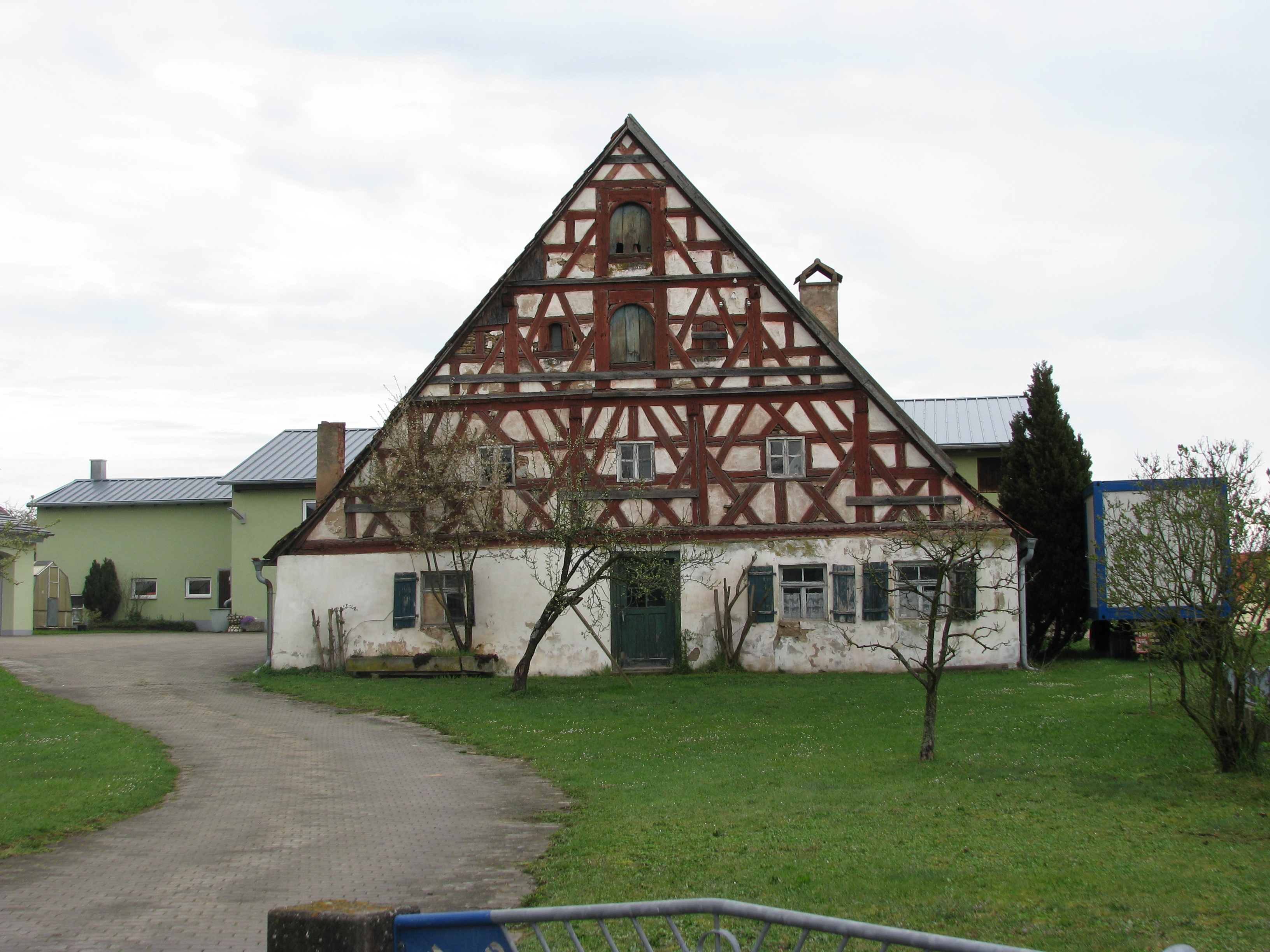 Mörsdorf, Ortsteil von Freystadt im Landkreis Neumarkt in der Oberpfalz, Bayern, Haus aus dem 17. Jahrhundert